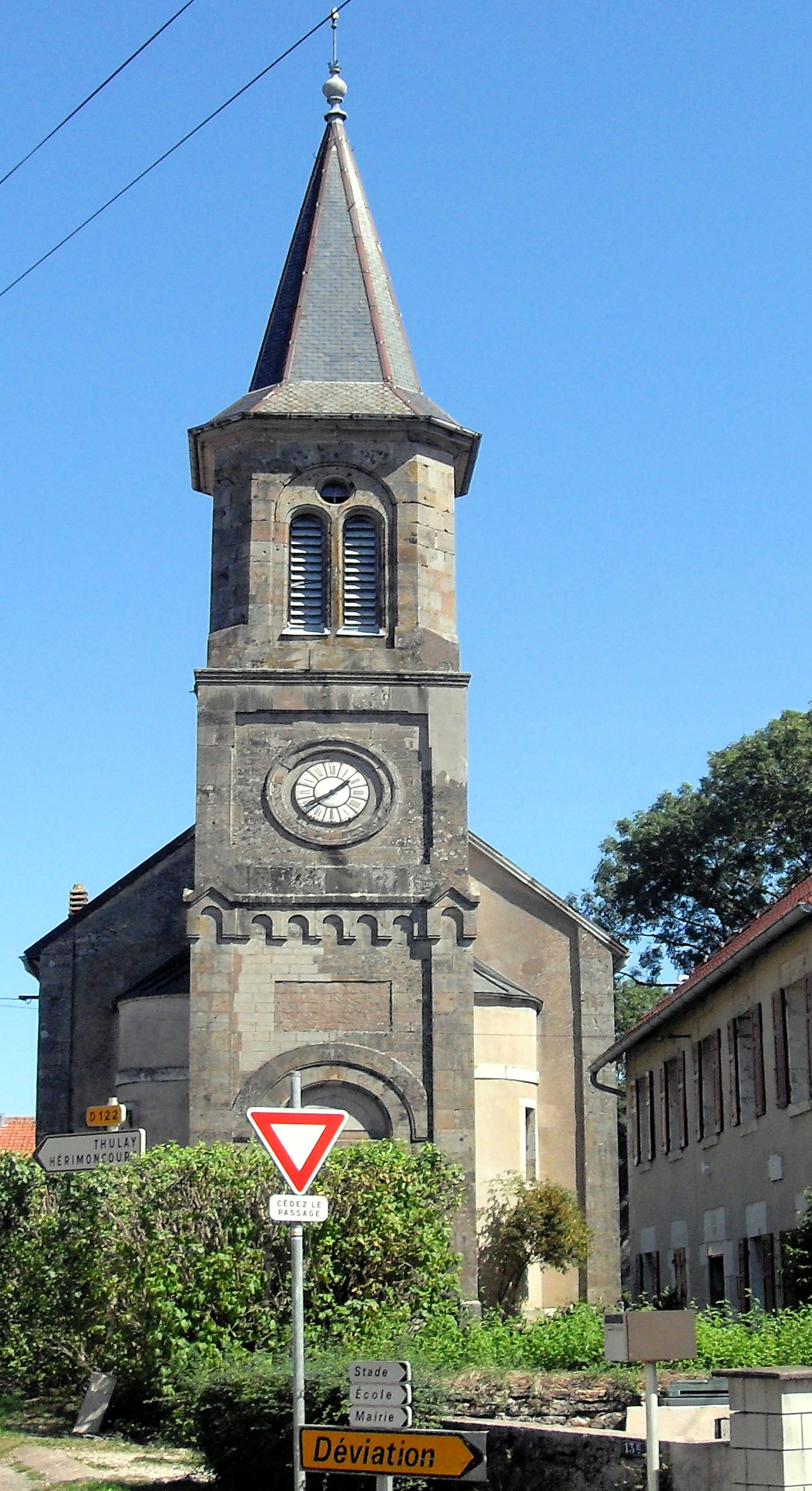 L'église luthérienne de Roches-lès-Blamont